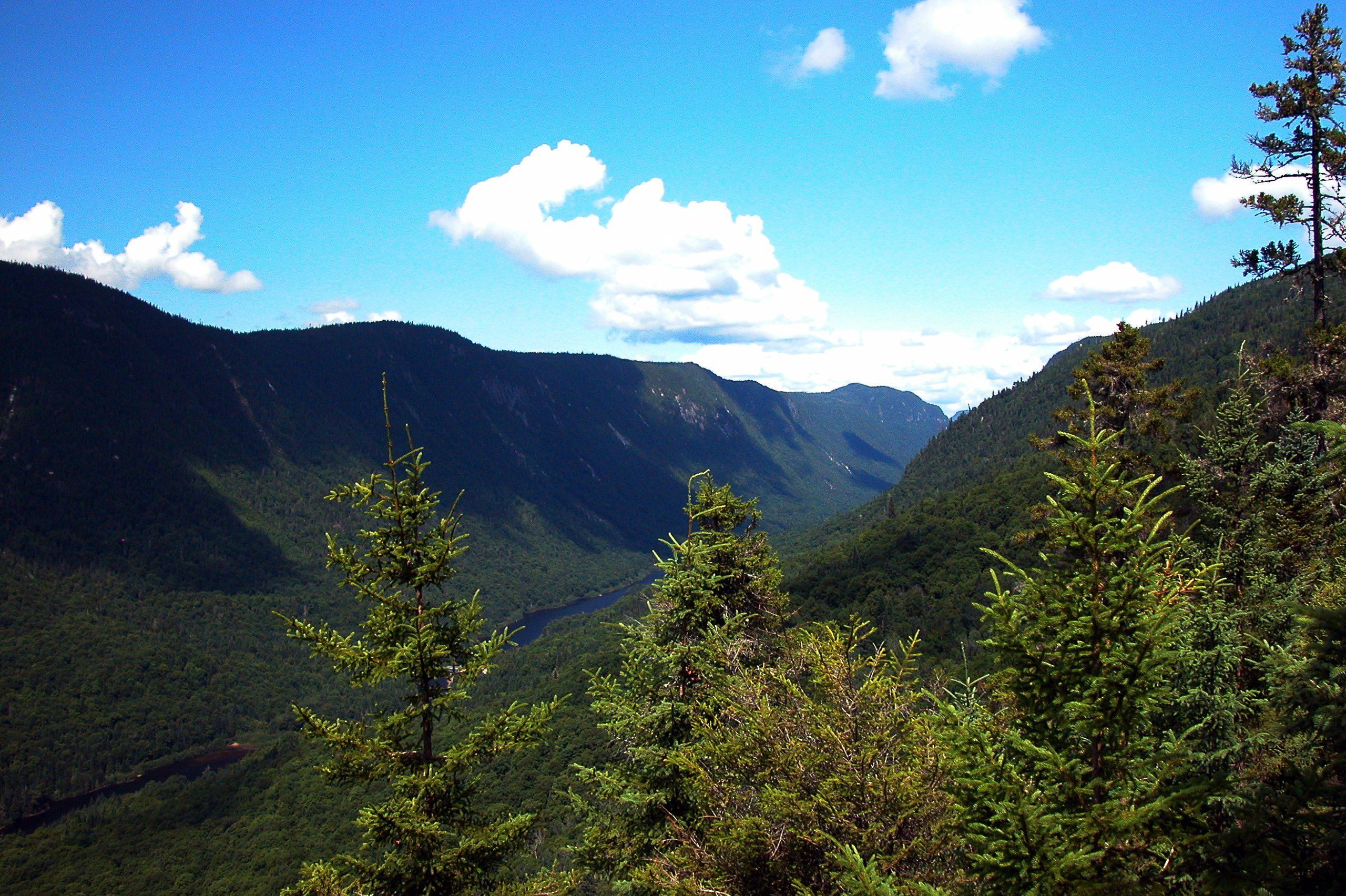 Parc de la Vallée de la Jacques-Cartier, Québec, Canada